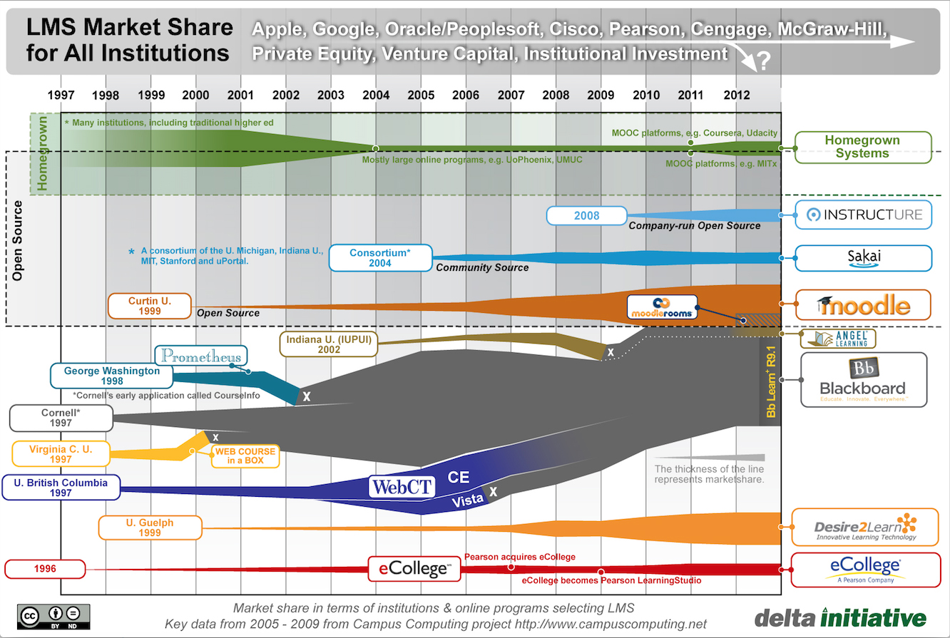 Gráfico en que se aborda el índice de penetración de los principales LMS o, dicho en otras palabras, Sistemas de gestión del aprendizaje.